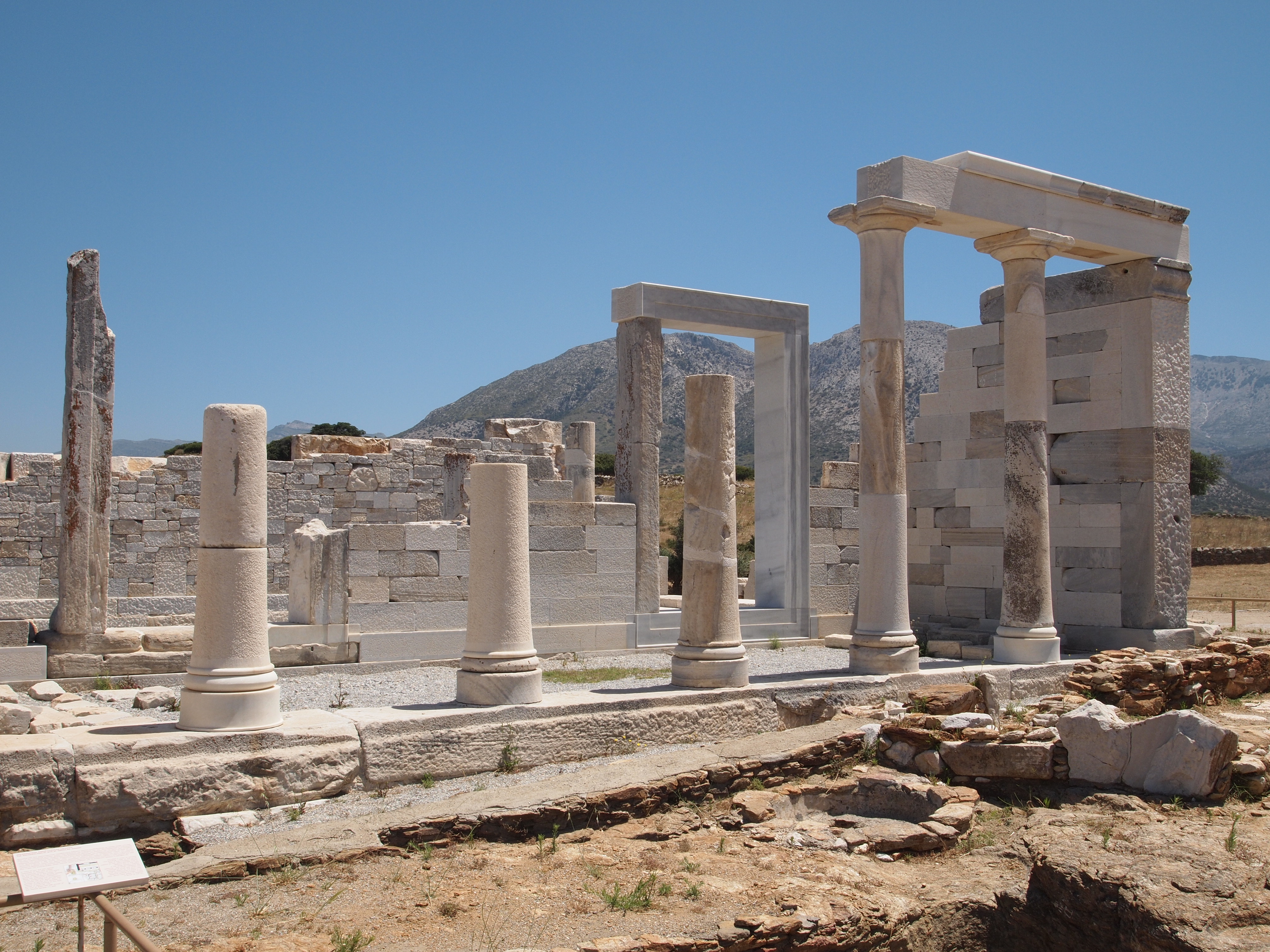 Demeter Temple on Naxos